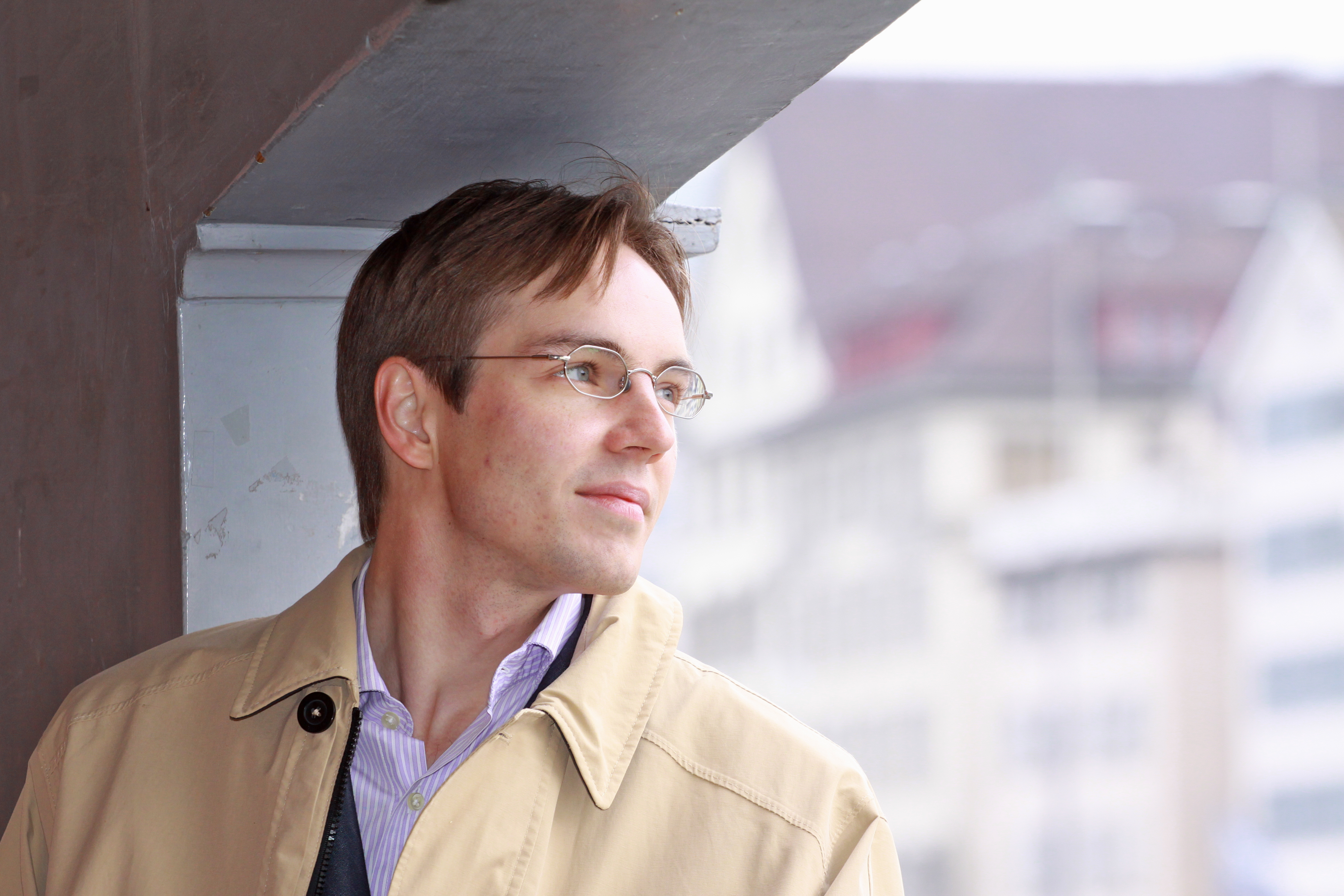 Sie dürfen das Foto mit Nennung des Autors honorarfrei vervielfältigen, verbreiten und öffentlich zugänglich machen. Foto: Jürg Vollmer / Infos